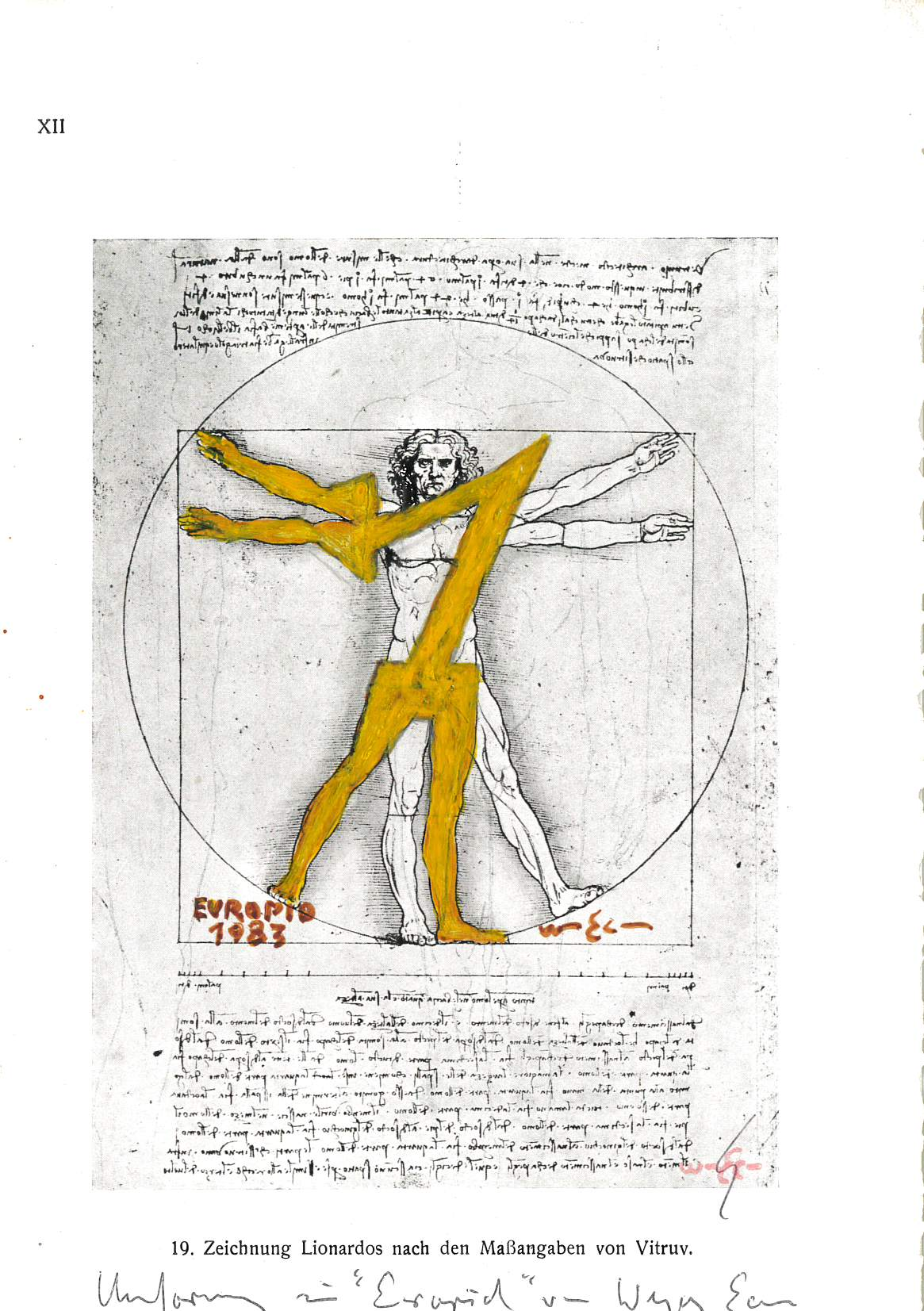 Erfindung Kunstfigur Europid 1983 Neues Menschliches Maß Buchdruck & Tusche